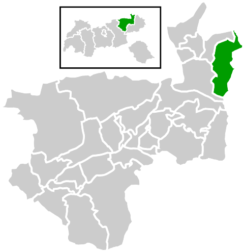 Lage der Gemeinde innerhalb des Bezirks Kufstein